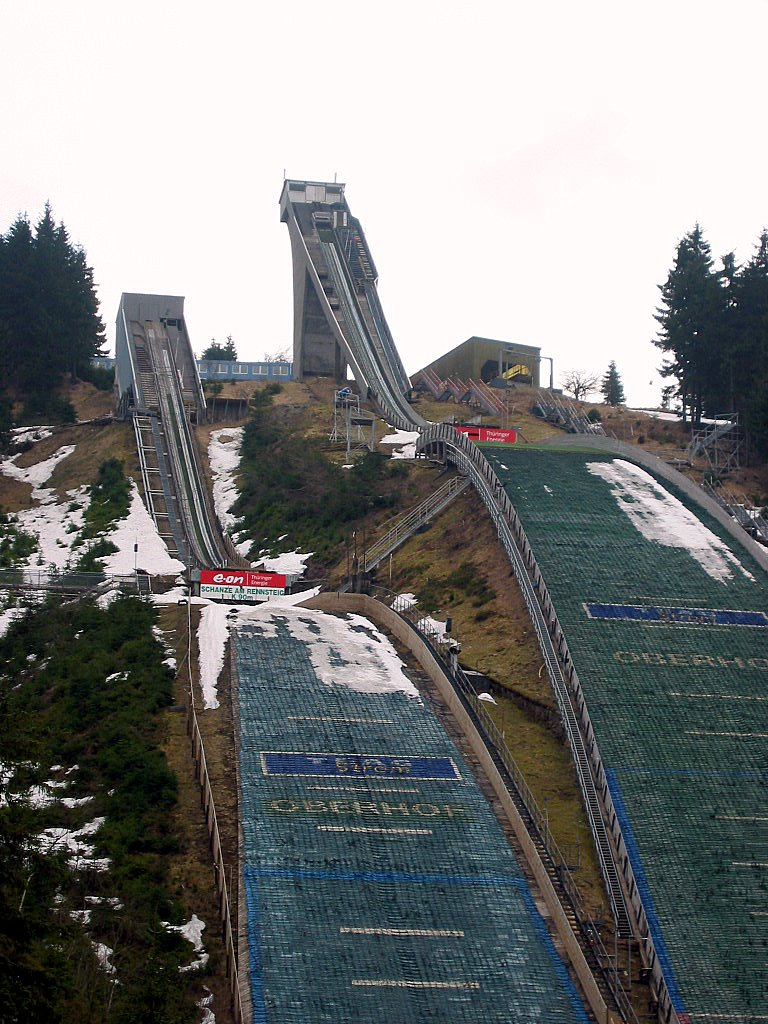 Schanzenanlage Kanzlersgrund (Hans Renner Schanze) in Oberhof